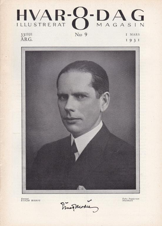 Einar Modig, envoyé